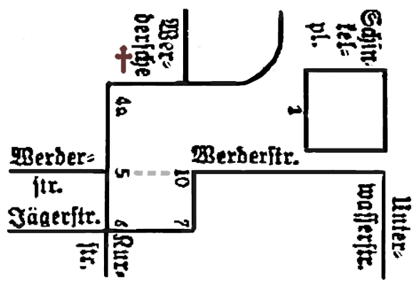 Werderscher Markt anno 1933